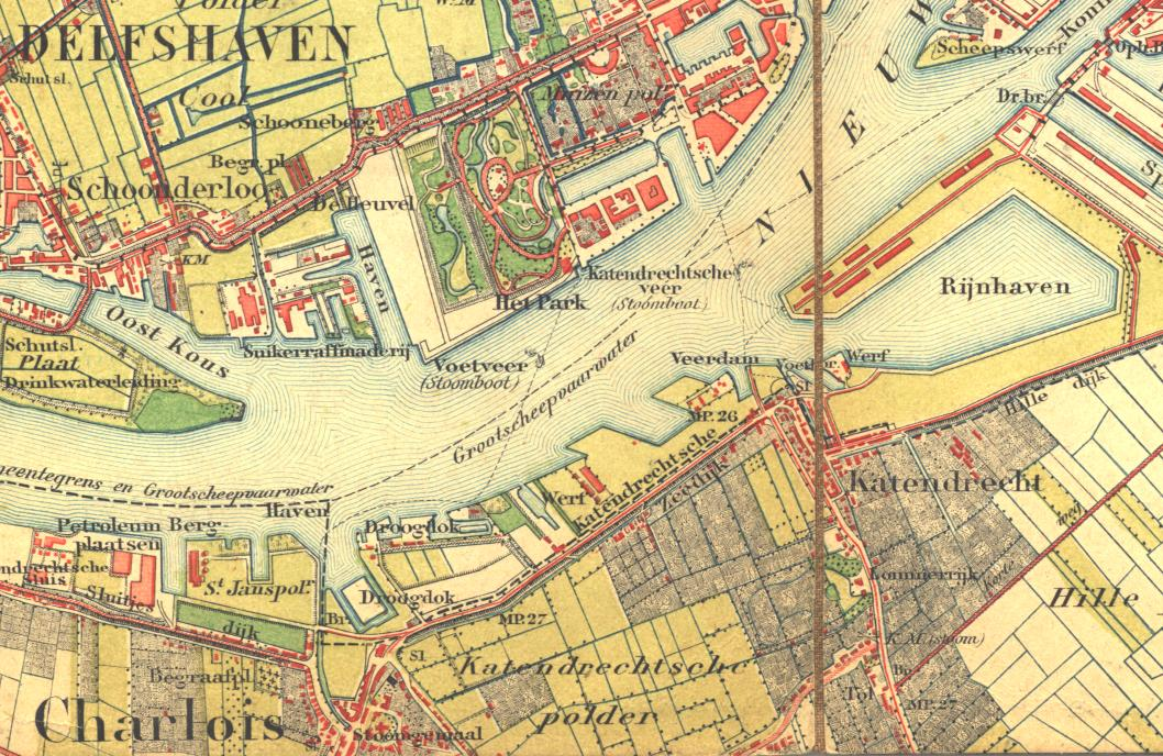 Katendrecht und Charlois, heute Stadtteile von Rotterdam, 1889, vor der Entstehung des Maashavens